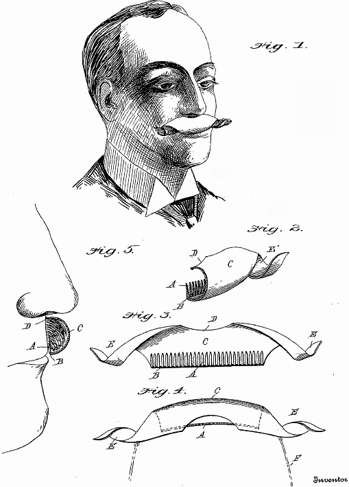 Один из вариантов наусника. Картинка из патента 1897 года.